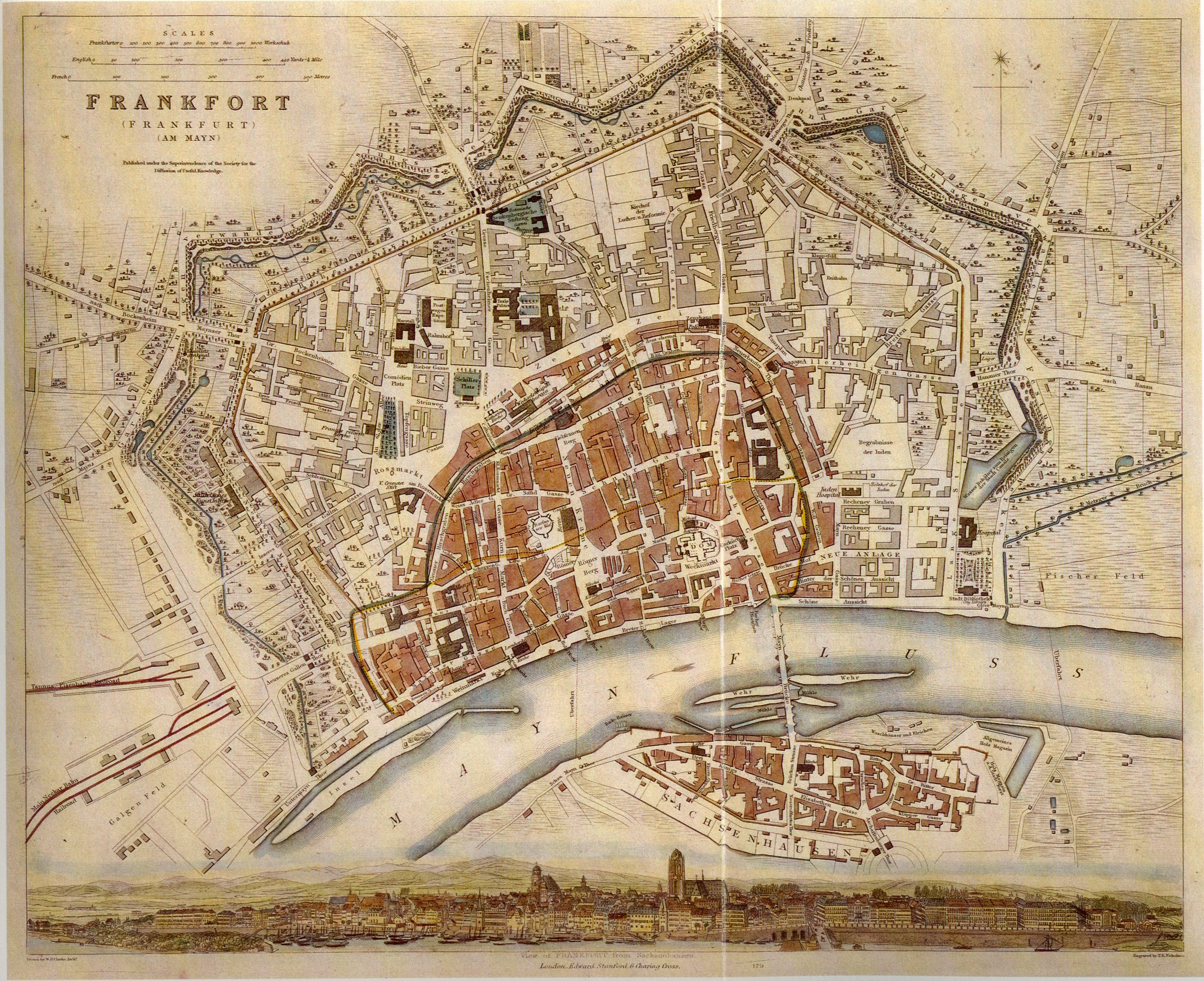 Englischer Stadtplan der Freien Stadt Frankfurt, um 1840 "Published under the Superintendence of the Society for the Diffusion of useful knowledge"